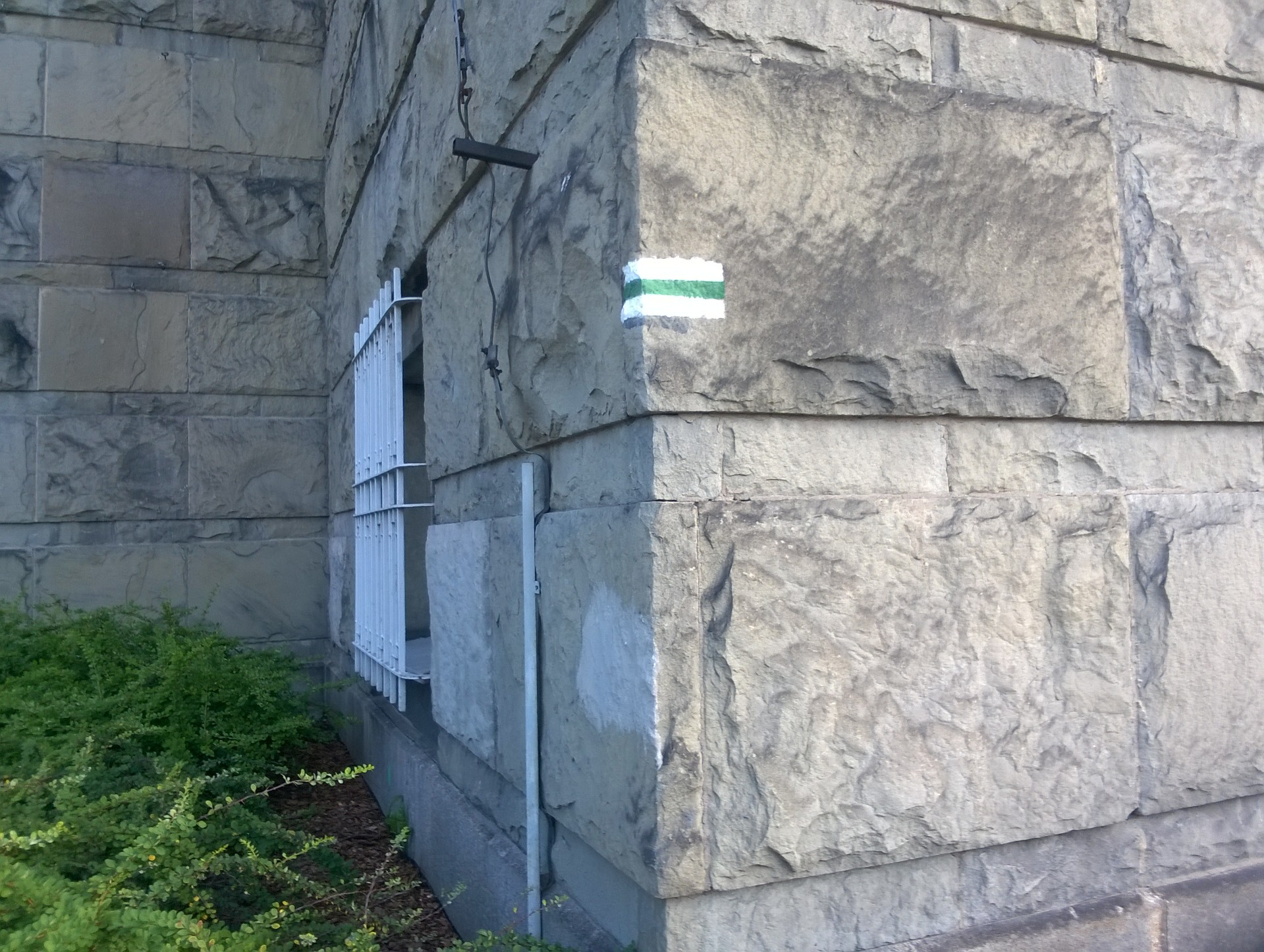 Znak zielonego szlaku pieszego na budynku rektoratu Politechniki Śląskiej od strony placu Krakowskiego